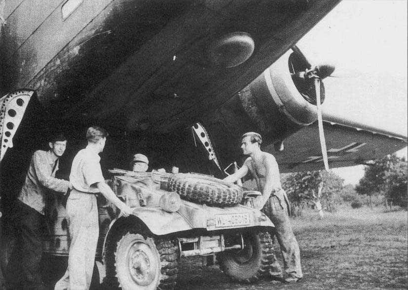 Aereo Savoia Marchetti SM.82 con Kubelwagen